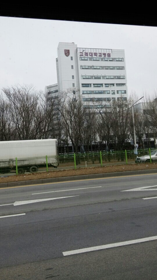 안산에 위치한 고대 안산병원